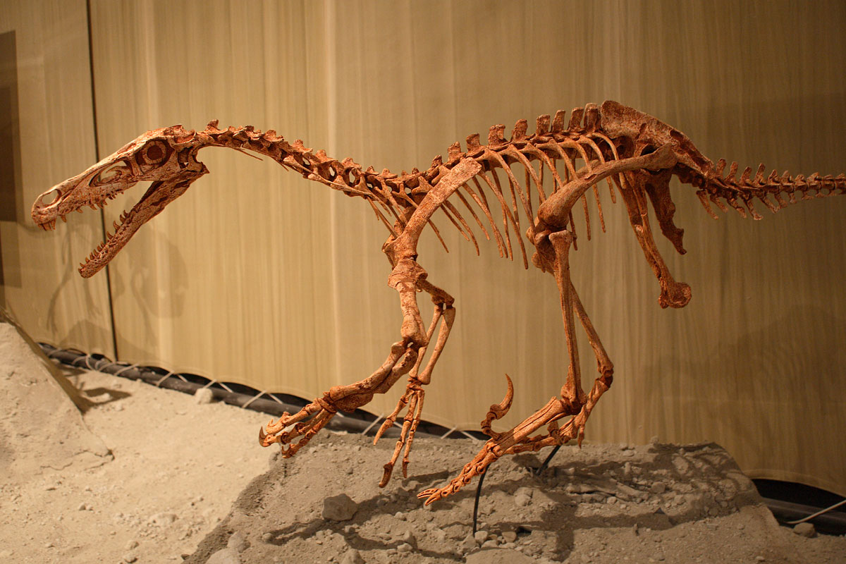 Velociraptor - 01